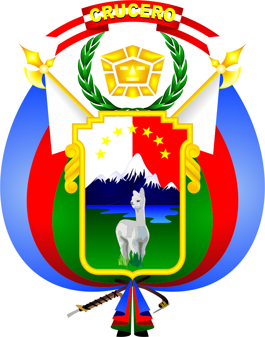 Distrito de Crucero - Provincia de Carabaya - Región Puno